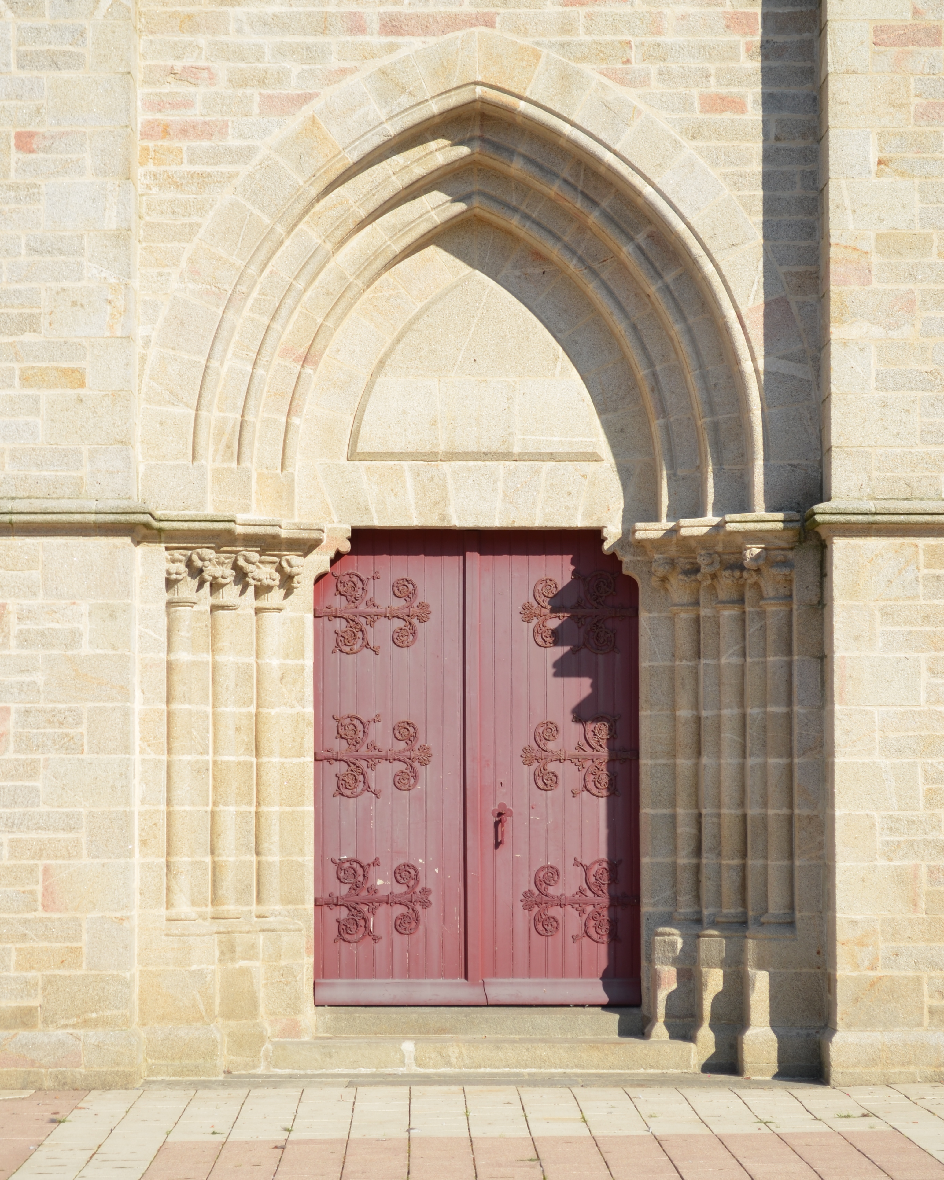 Église de Belleville-sur-Vie (Vendée)